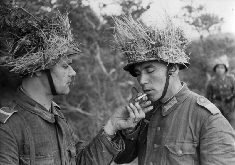 Wolga-Tartaren in der Kampfpause Foto H. Philipps Wehrbilderdienst Nr. A 79/28